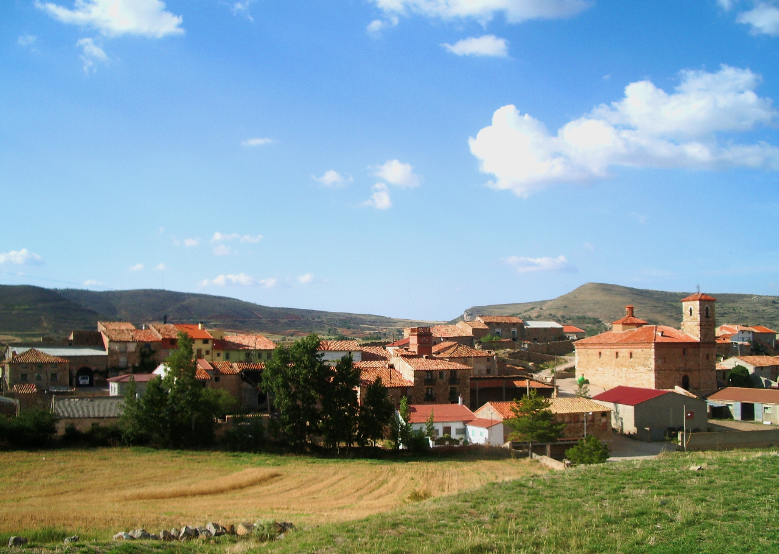 Portalrubio. comarca:Comunidad de Teruel. Provincia: Teruel. landscape view general.